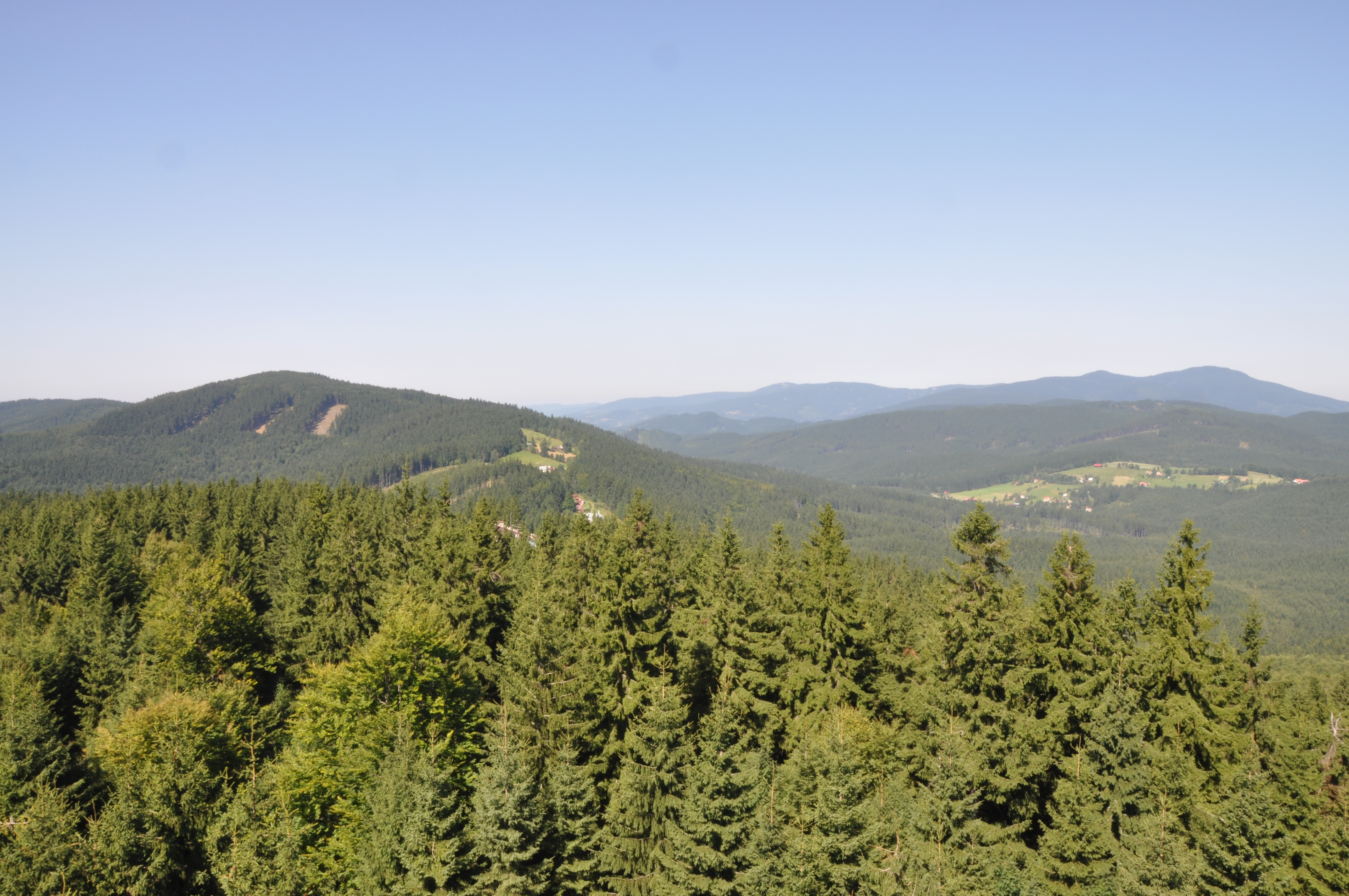 výhled směr na Vysokou (1024 m)